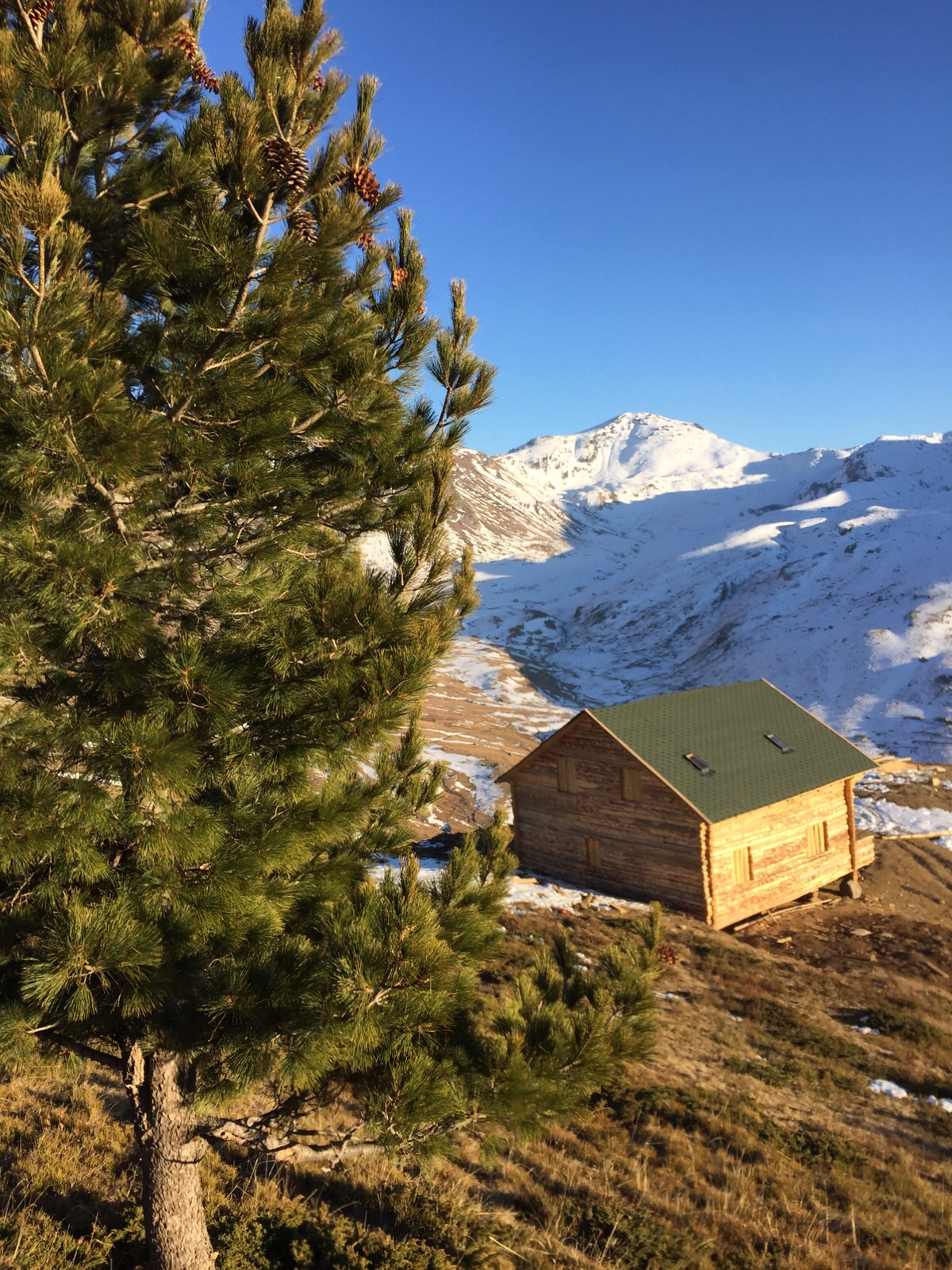 Lugina e Valbones, Tropoje